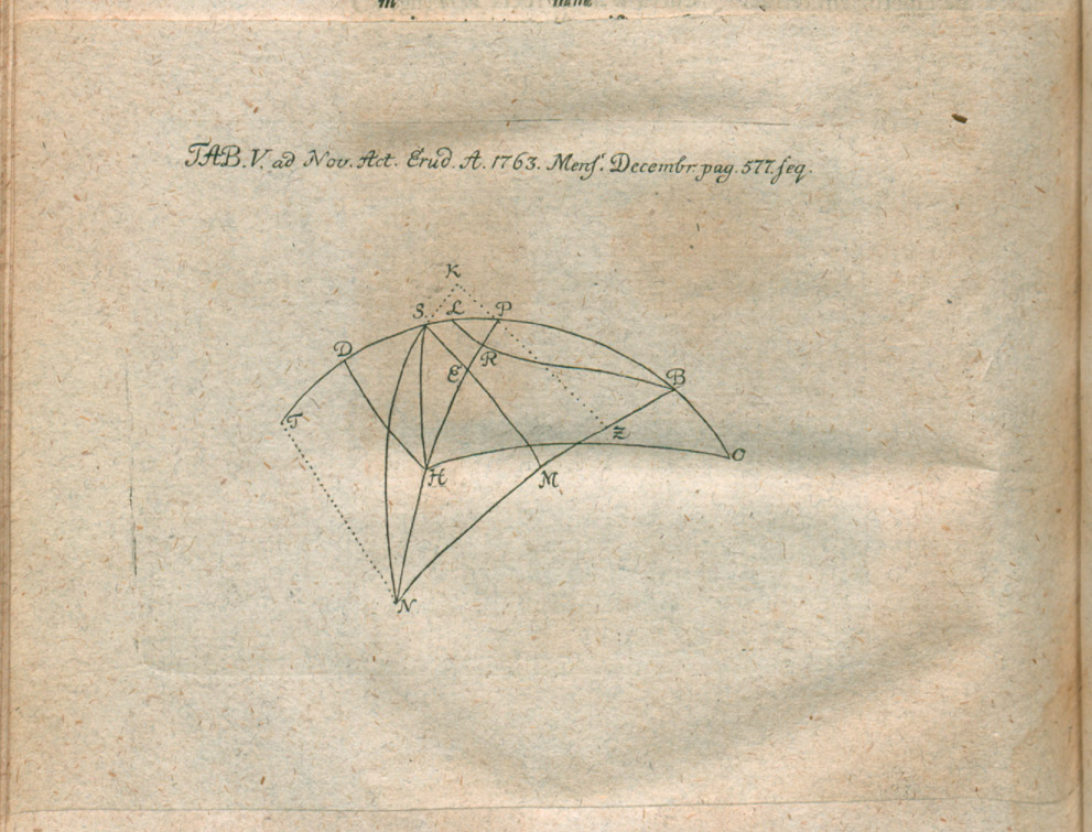 Illustration